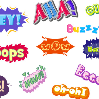 son unas pocas de las onomatopeyas que solemos utilizar